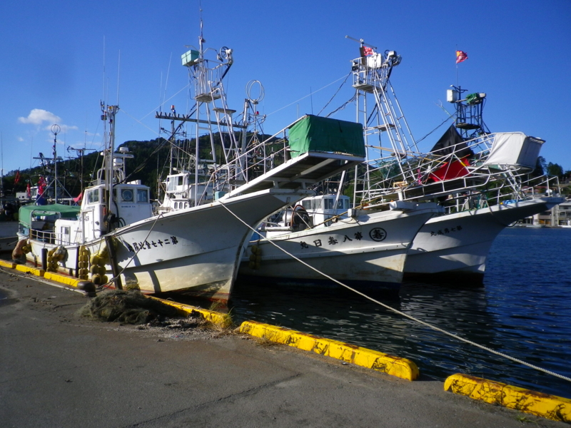 気仙沼漁港。2012年10月撮影。